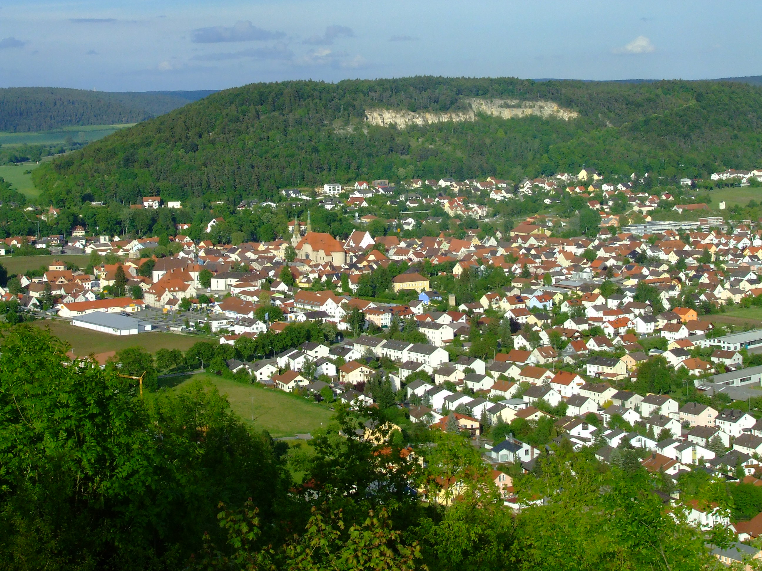 Stadt Beilngries, Kreis Eichstätt, vom Hirschberg aus, im Hintergrund der Arzberg.